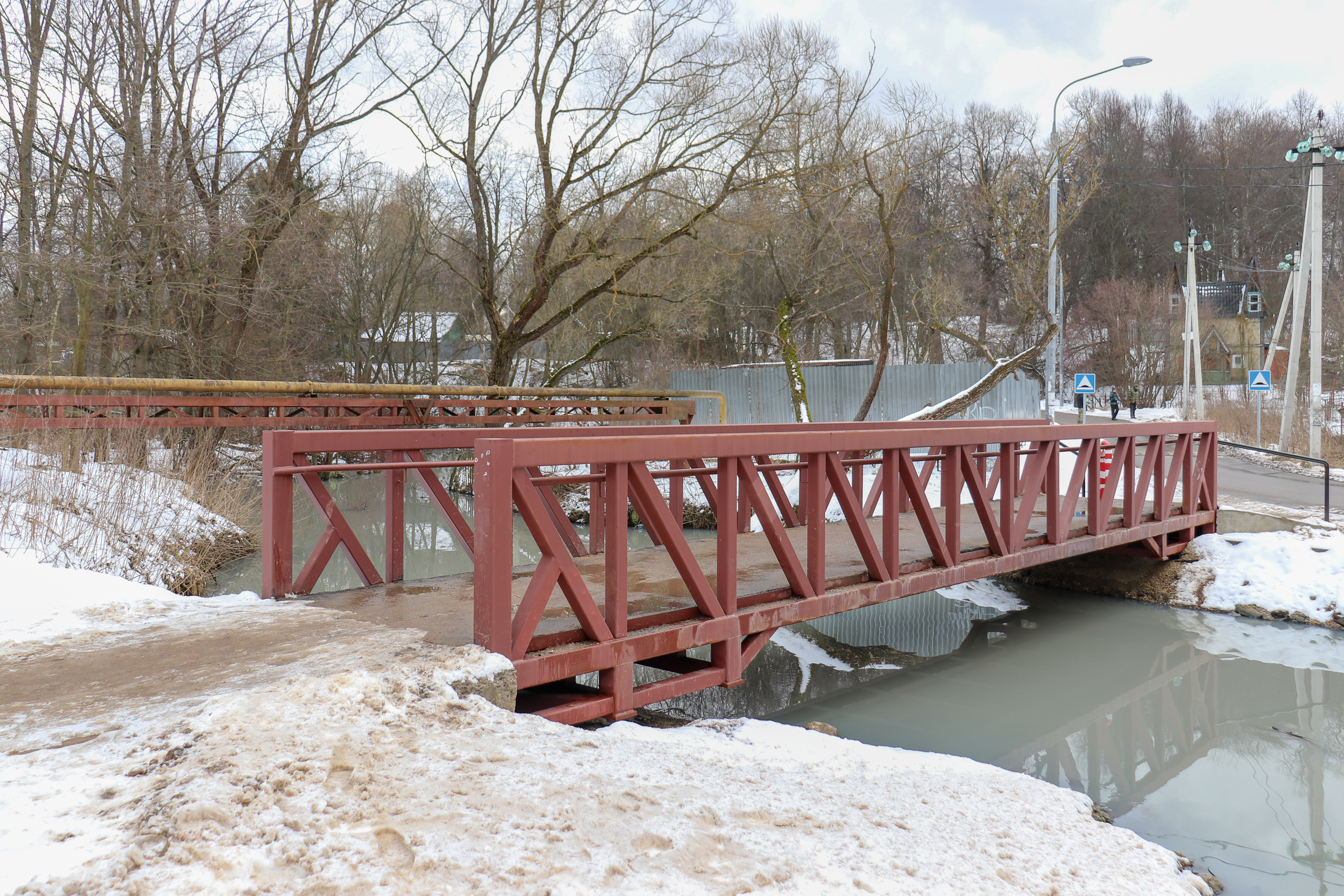 Пешеходный мост над рекой Ликовой около деревни Мешково. Возведен осенью 2019 года